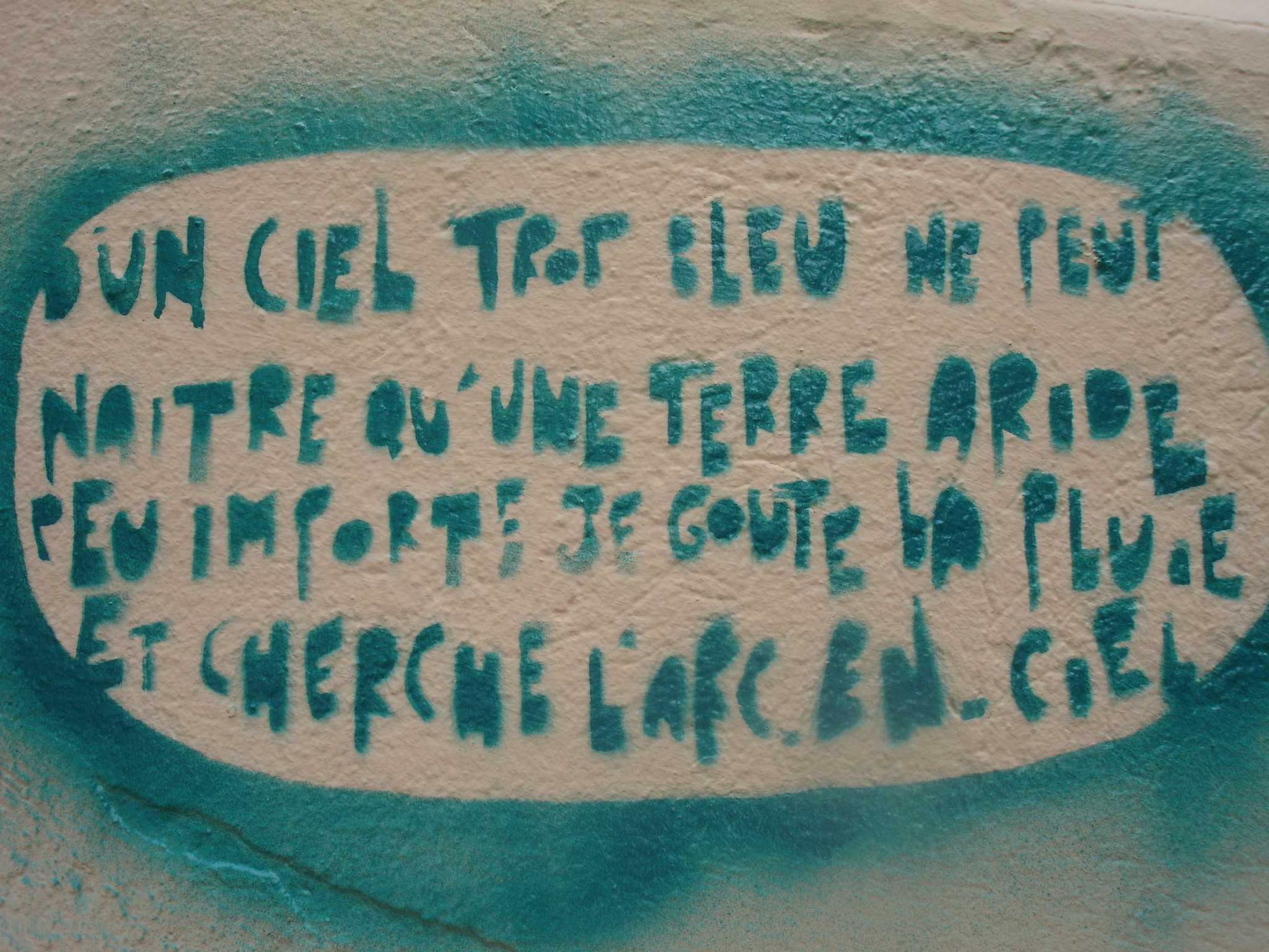 Maxime d'un Canut (lyonnais) affichée sur les murs des Pentes de La croix Rousse